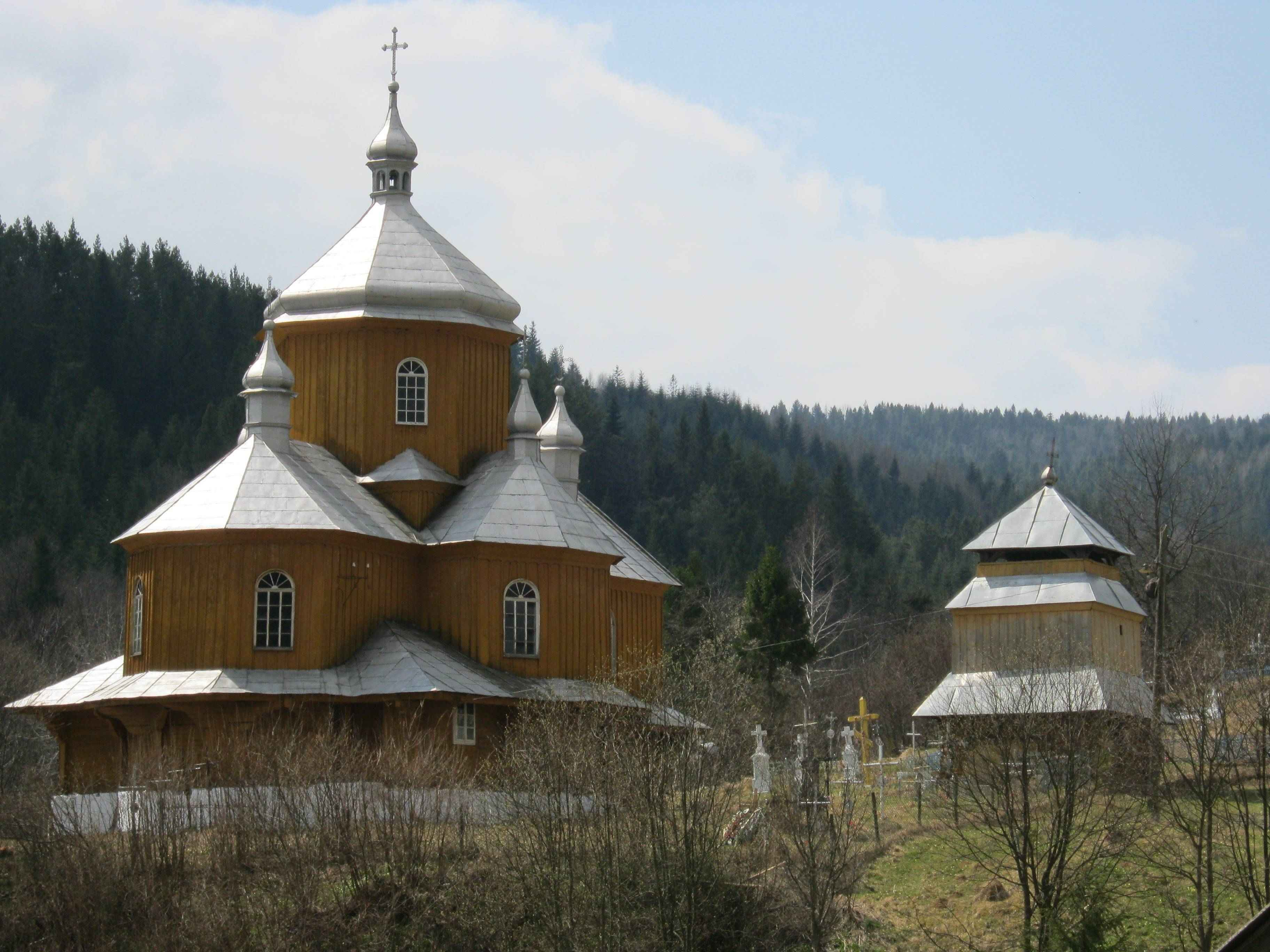 Церква в селі Свидник, Львівської області. Це дерев'яний храм, із старовинним іконостасом.